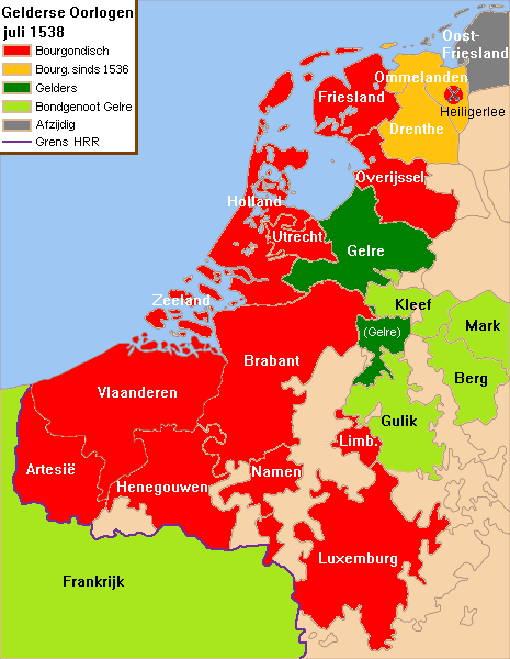 Overzicht Gelderse Oorlogen in 1538, na de Slag bij Heiligerlee (1536) en de dood van Karel van Gelre. Willem V van Gulik-Kleef-Berg volgde hem op als hertog van Gelre.